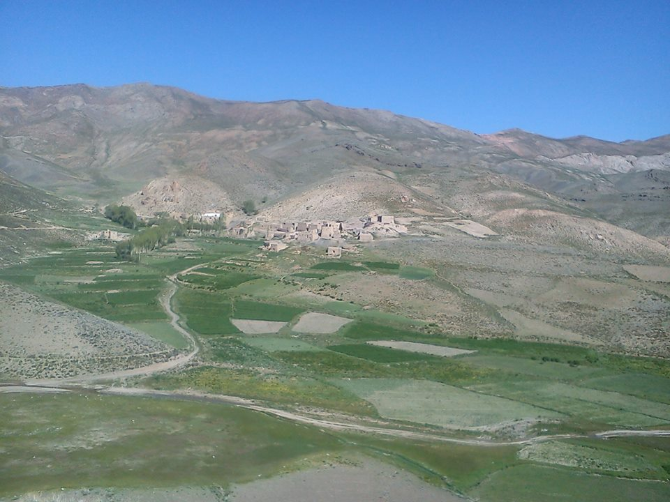 هوته علودانی که بین دره شیملتو و دره علودانی و دشت ناور قرار گرفته